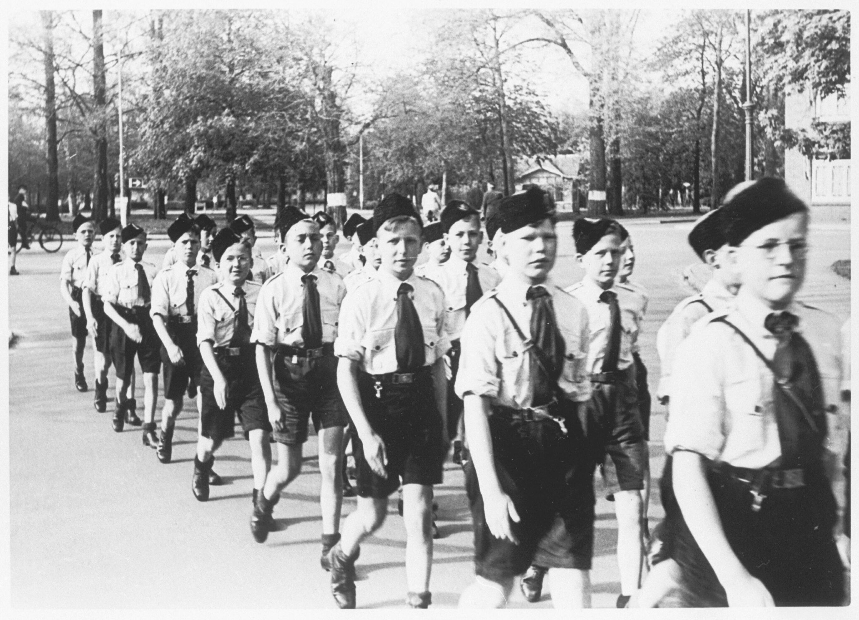 'Meeuwen' van de NJS, jongens onder de 12 jaar, tijdens een optocht. Deze foto is afkomstig uit het archief van de Fotodienst der NSB.